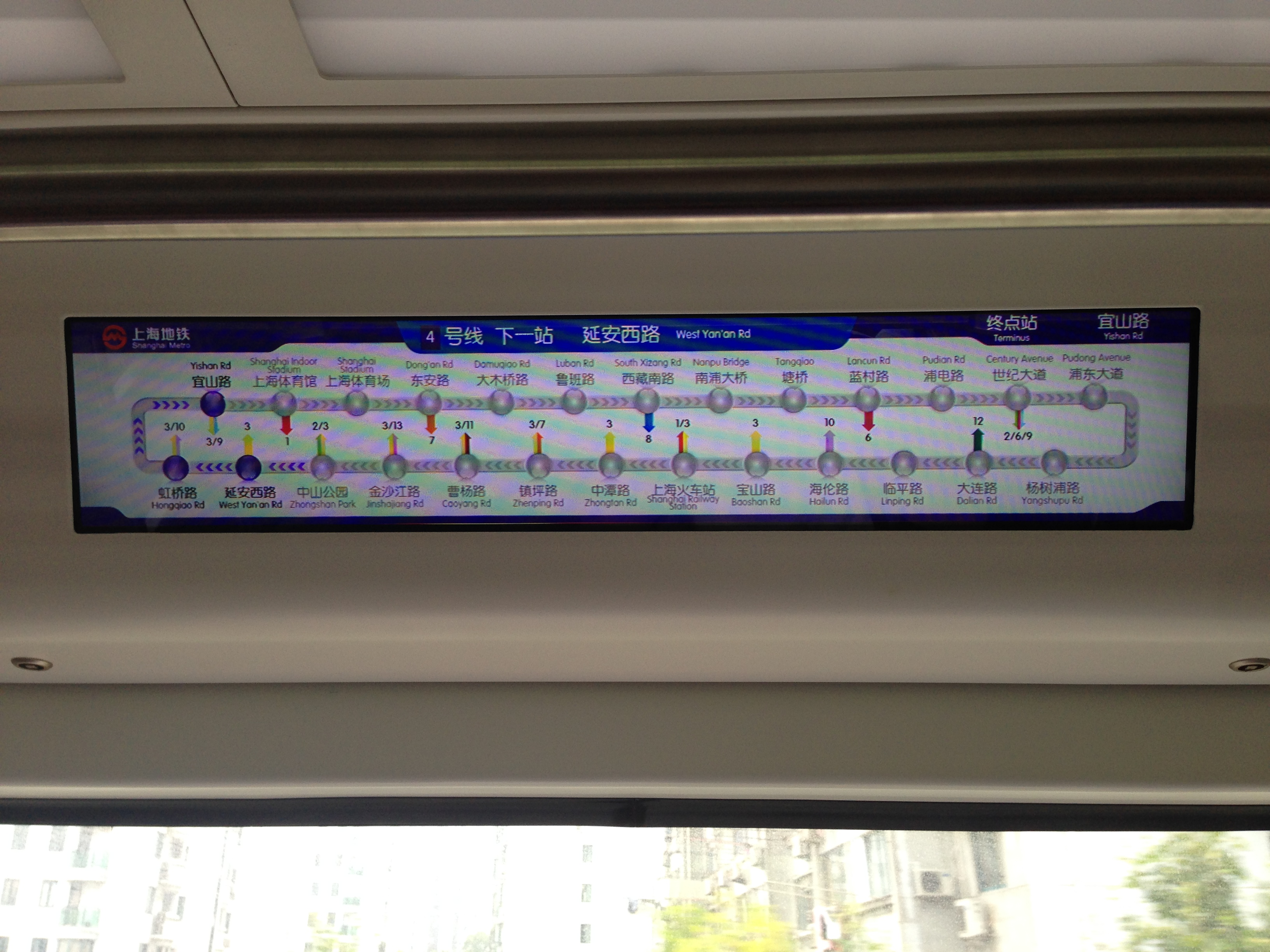 4号线北车阿尔斯通列车LED